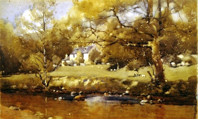 Moniaive